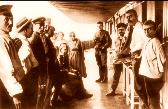 Агітпароплав "Червона зірка". Надія Крупська з командою. 1920-ті роки